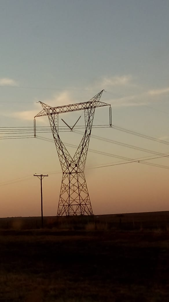 Comparación entre torres utilizadas para líneas eléctricas de baja y alta tensión